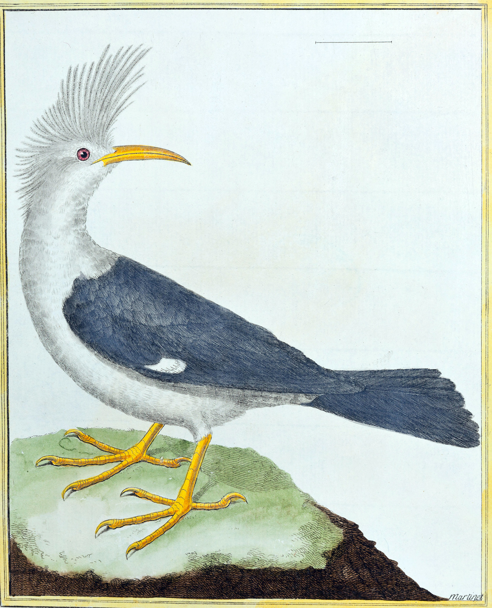 "Le Huppe, du Cap du bonne-Esperance". From Histoire Naturelle Des Oiseaux (1770). By François-Nicolas Martinet (c. 1725-c. 1804) (artist and engraver) & Comte de Buffon (Georges Louis Leclerc) (1707-1788) (editor).